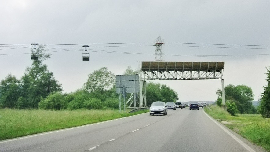 Dotternhausen, Bundesstraße 27, Luftbahn der Holcim, Schutzbrücke.